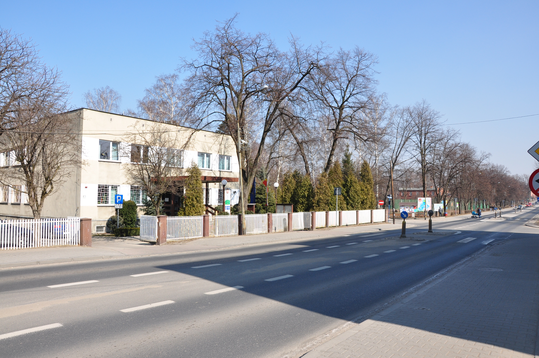 Urząd Miejski Chełmek ul. Krakowska 11